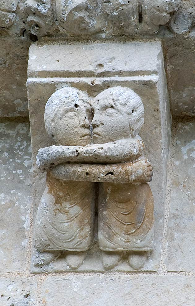 Un couple d'amoureux, modillon de la façade sud du transept, Église Saint-Pierre d'Aulnay, France